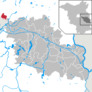 Schöneiche_bei_Berlin in Brandenburg (Country) - District Oder-Spree